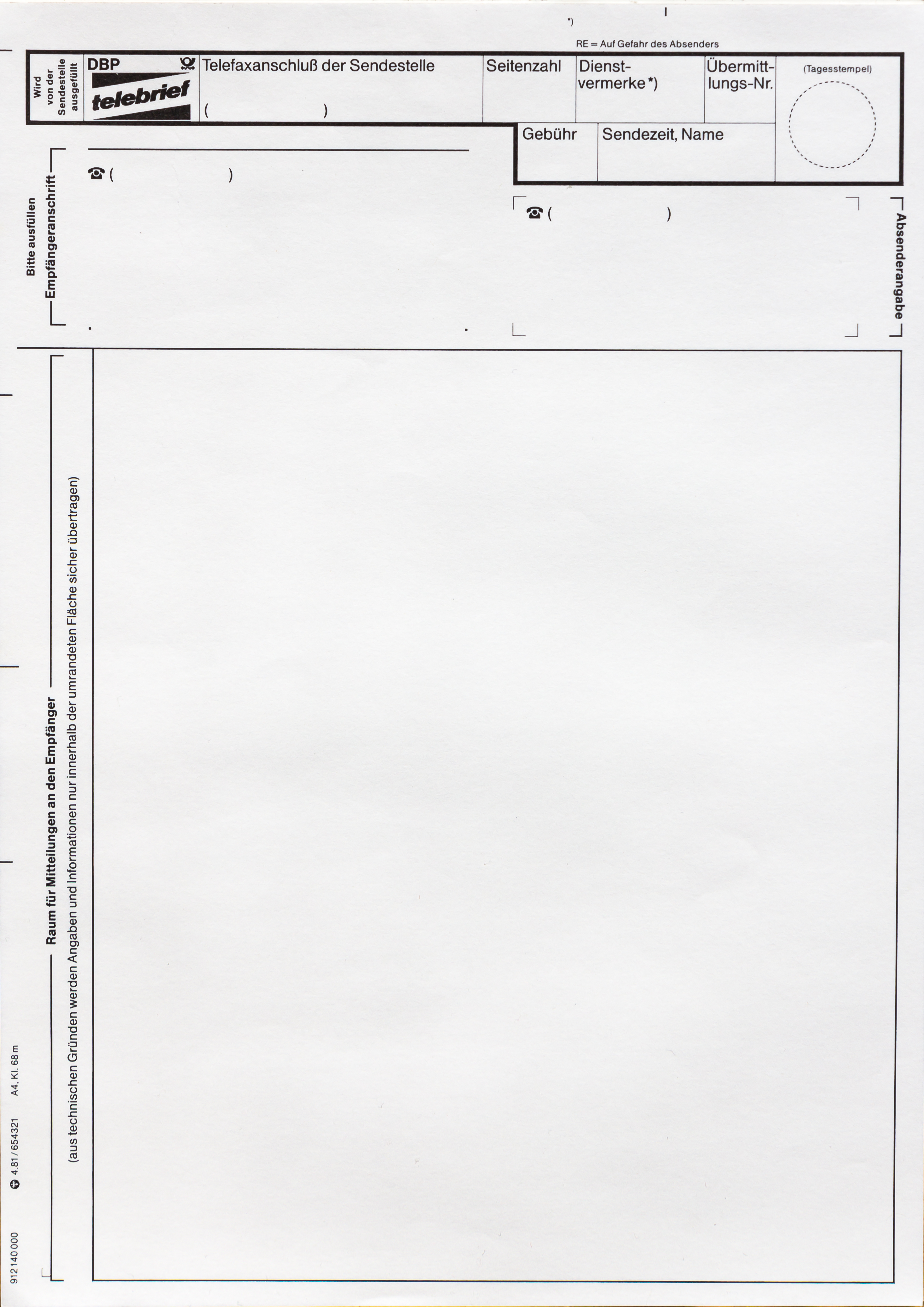 Telebrief Deutsche Bundespost, Formblatt national 1981